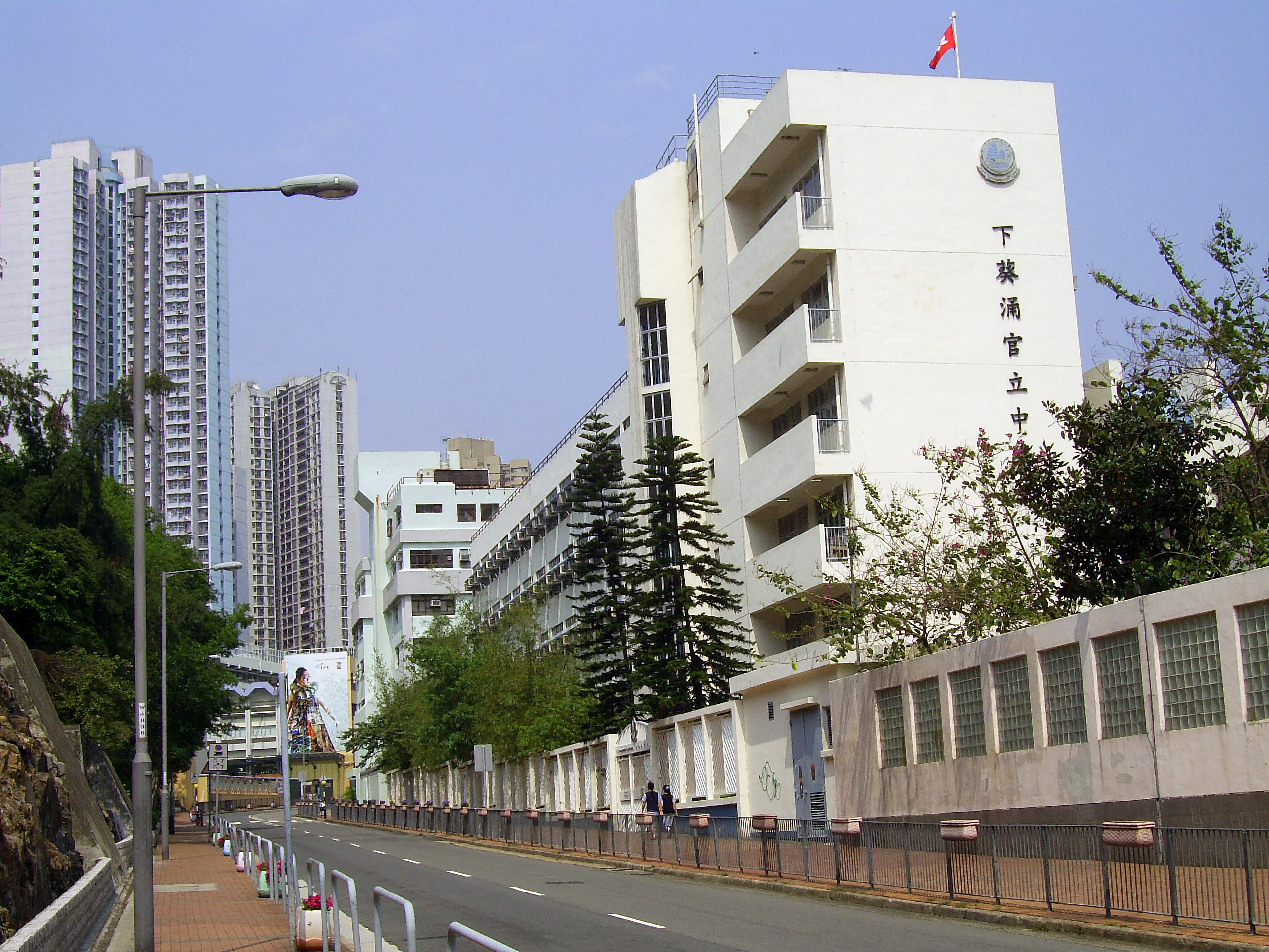 中文（香港）: 下葵涌官立中學